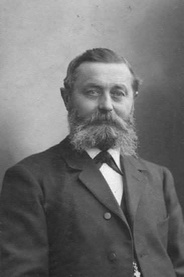 Peter Jakob von Danwitz (1845-1922)